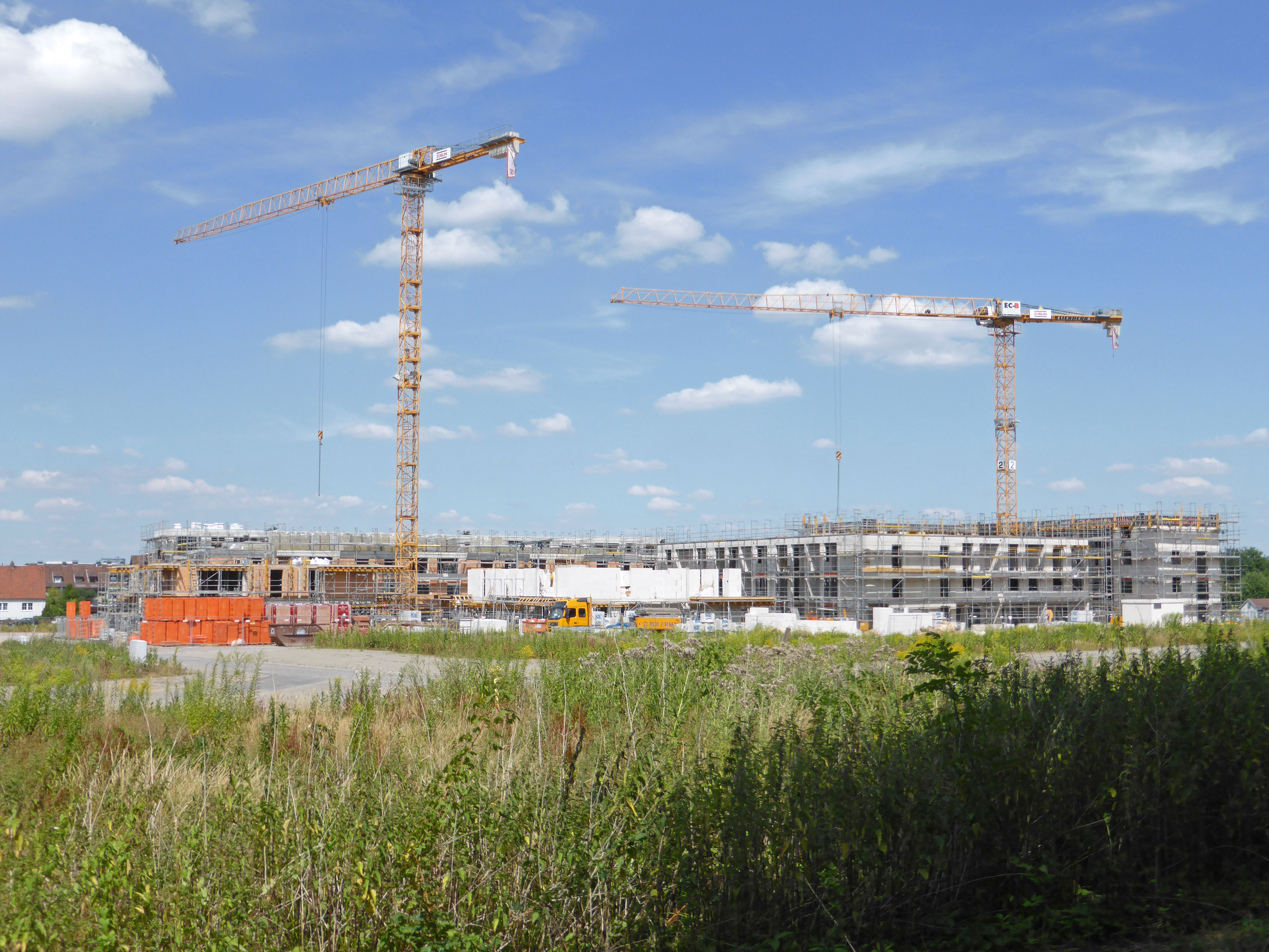 Baugebiet "Hellwinkel Terrassen" in Wolfsburg, Stand 16. Juli 2018.